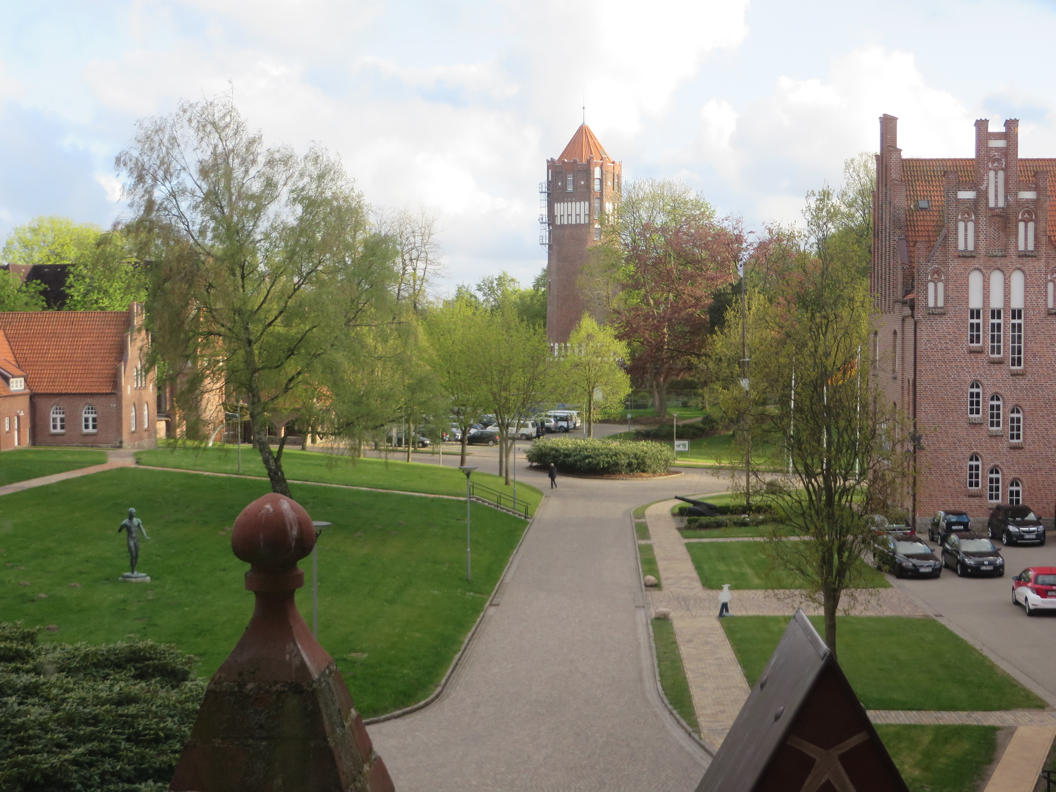 Vorhof bzw Südhof der MSM (Flensburg-Mürwik Mai 2015)